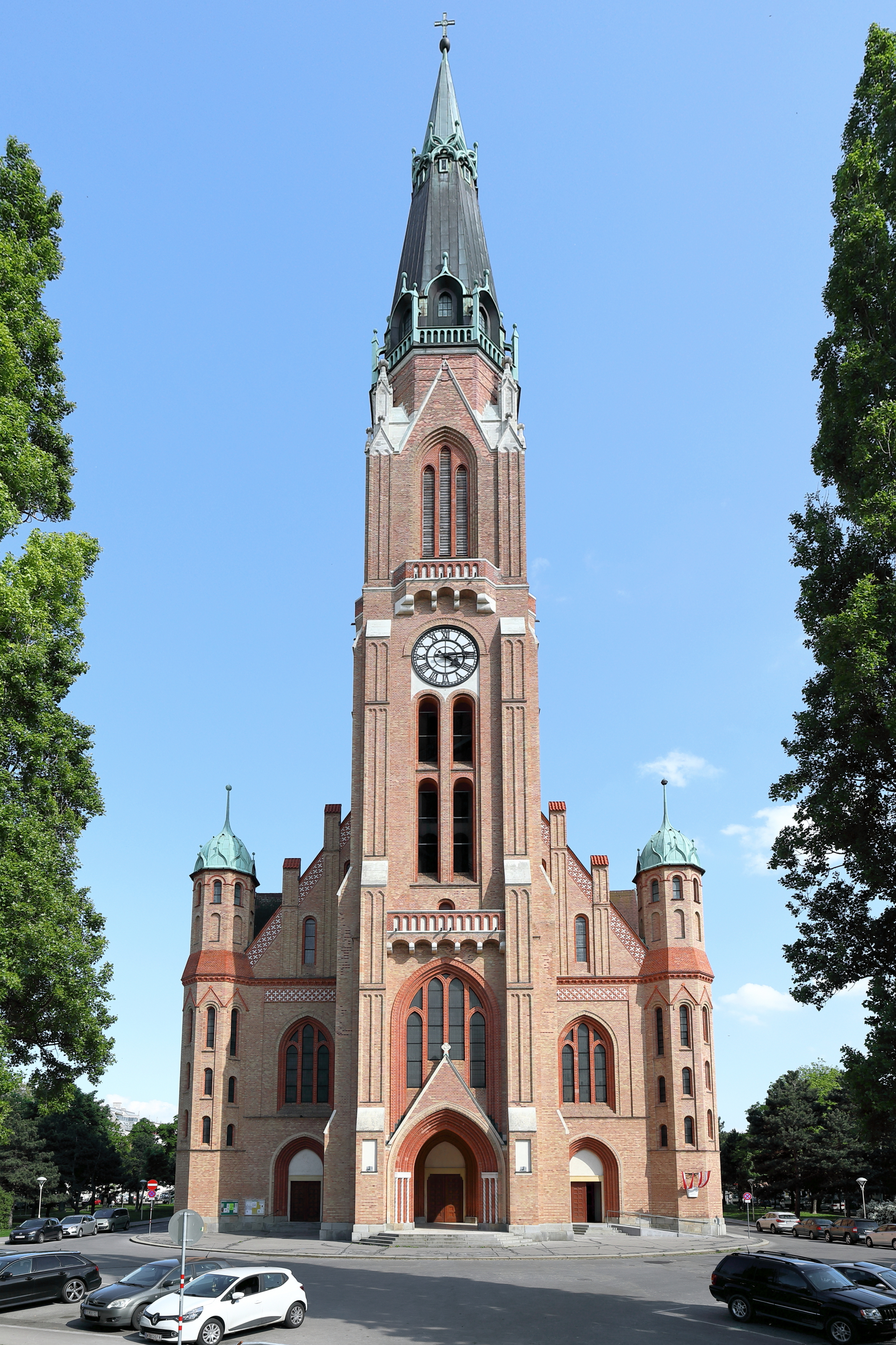 Die Donaufelder Pfarrkirche im 21. Wiener Bezirk Floridsdorf. Die dreischiffige Hallenkirche mit einem 96 Meter hohen Kirchturm wurde ab 1905 errichtet und am 8. Juni 1914 geweiht.